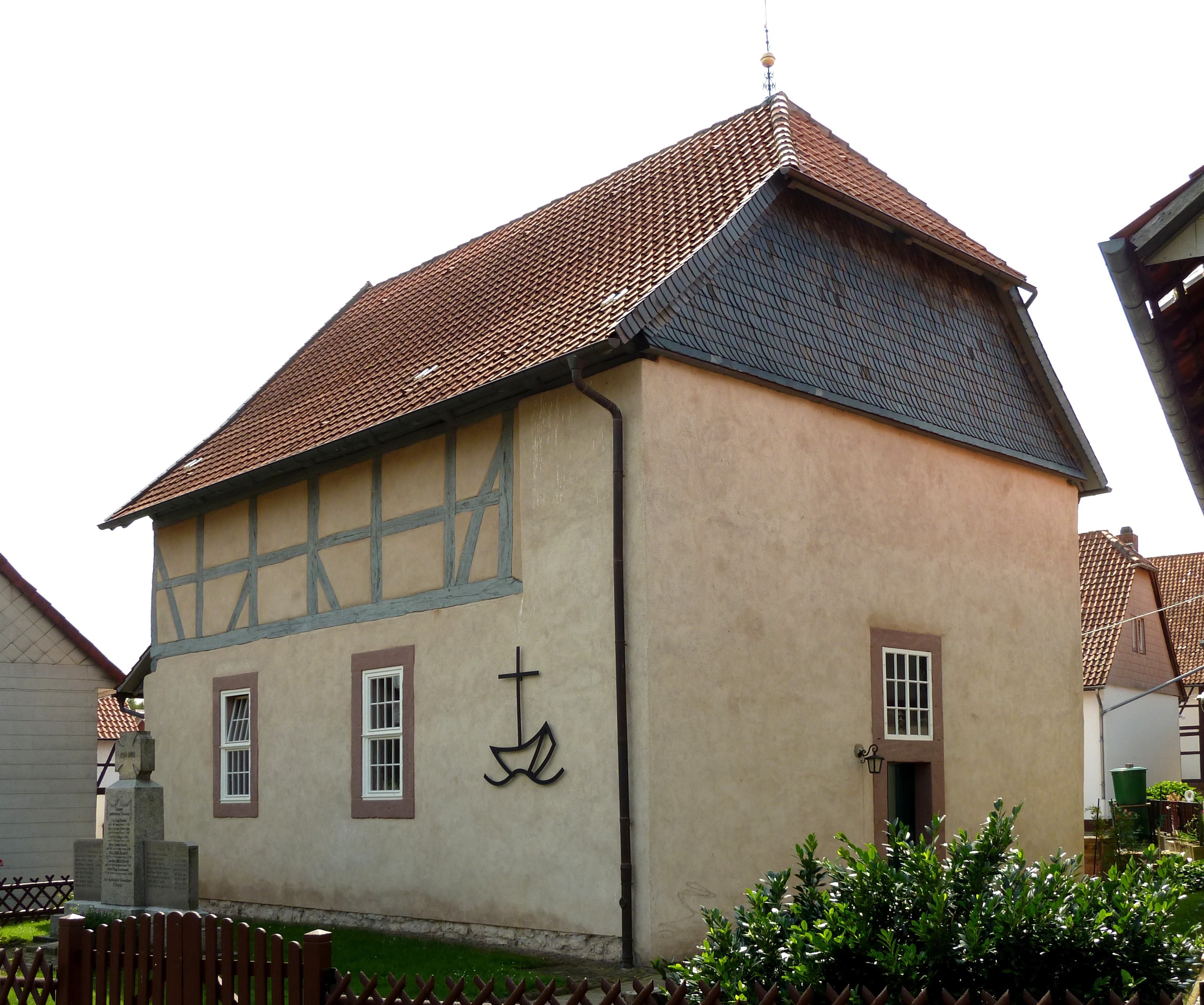 Ev.-luth. Kapelle St. Martinus in Elvese, Flecken Nörten-Hardenberg, Landkreis Northeim, Niedersachsen. Verputztes Bruchsteinmauerwerk mit Fachwerkteil. Im Kern Ende 12./Anfang 13. Jahrhundert als Wehrkirche errichtet, Umbau und Erweiterung 1606, Fenstererneuerung wohl im 18. Jh. (Angaben aus: Christian Kämmerer, Peter Ferdinand Lufen: Landkreis Northeim, Teil 1. Südlicher Teil mit den Städten Hardegsen, Moringen, Northeim und Uslar, den Flecken Bodenfelde und Nörten-Hardenberg, der Gemeinde Katlenburg-Lindau und dem Gemeindefreien Gebiet Solling. In: Christiane Segers-Glocke (Hrsg.): Denkmaltopographie Bundesrepublik Deutschland. Baudenkmale in Niedersachsen. Band 7.1, CW Niemeyer, Hameln 2002, S. 196.)